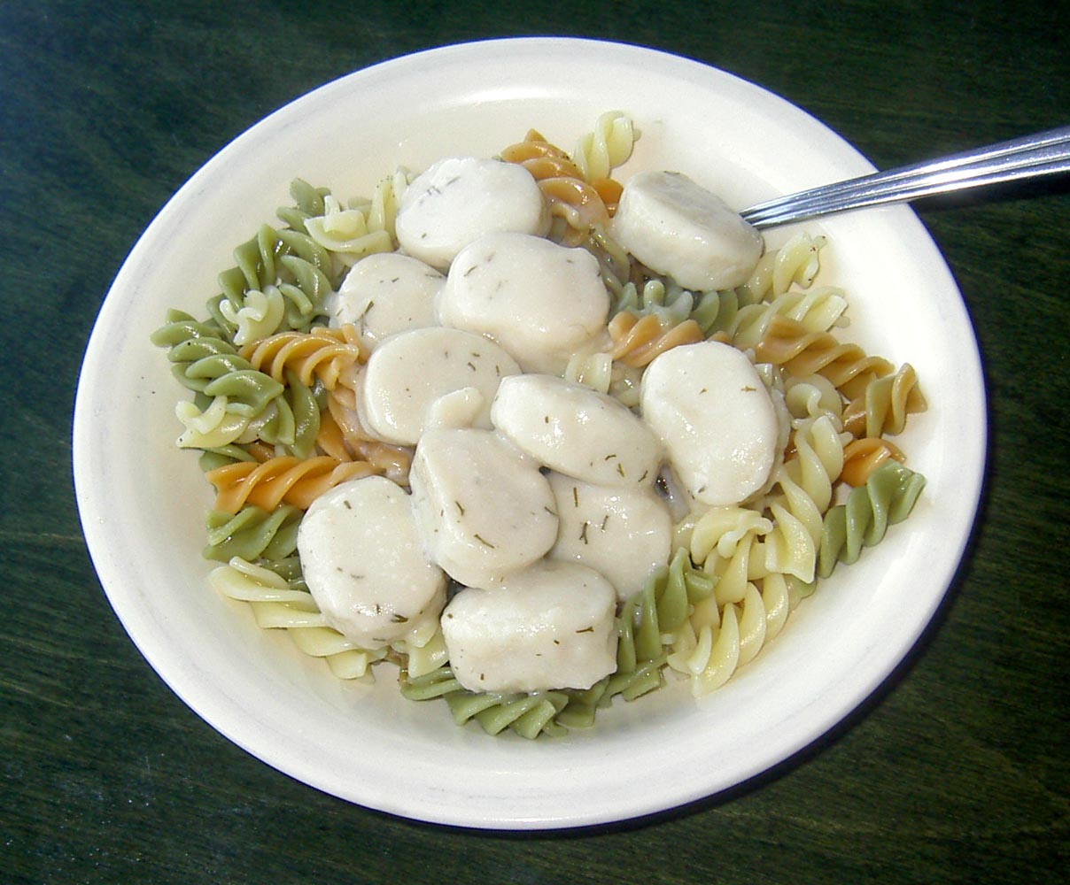 Fiskbullar